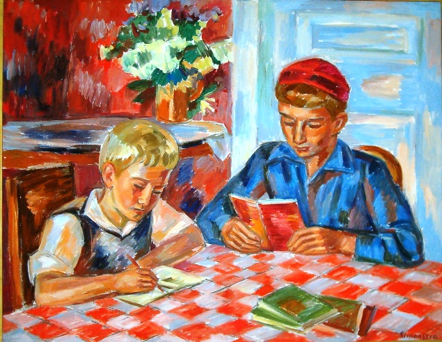 Läxan